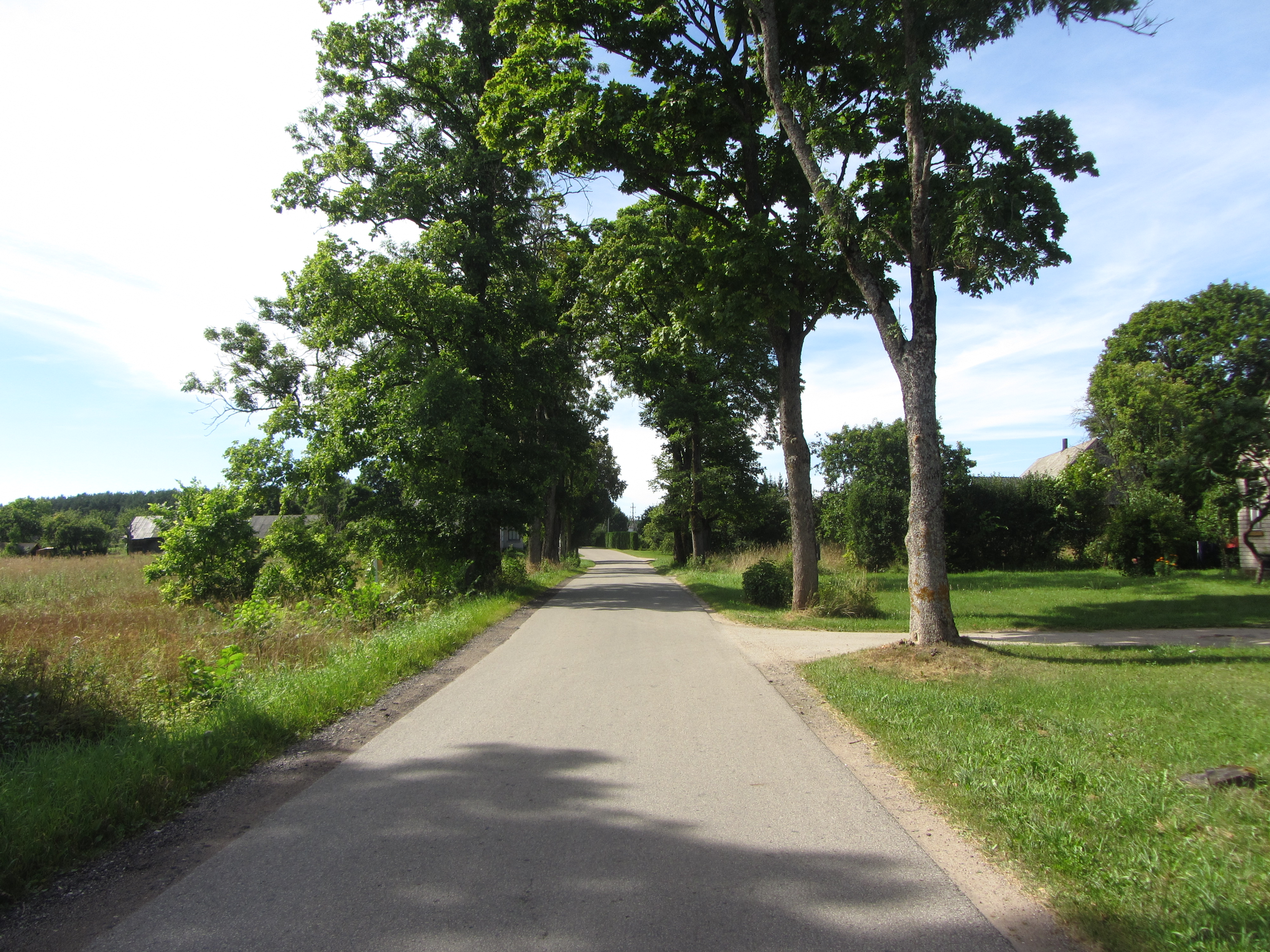 Daujočiai 29354, Lithuania